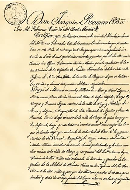 Acta fundacional de la Cofradía de la Soledad de Nuestra Señora, 20 de enero de 1594